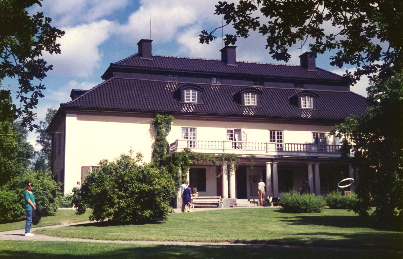 Selma Lagerlövs Mårbacka